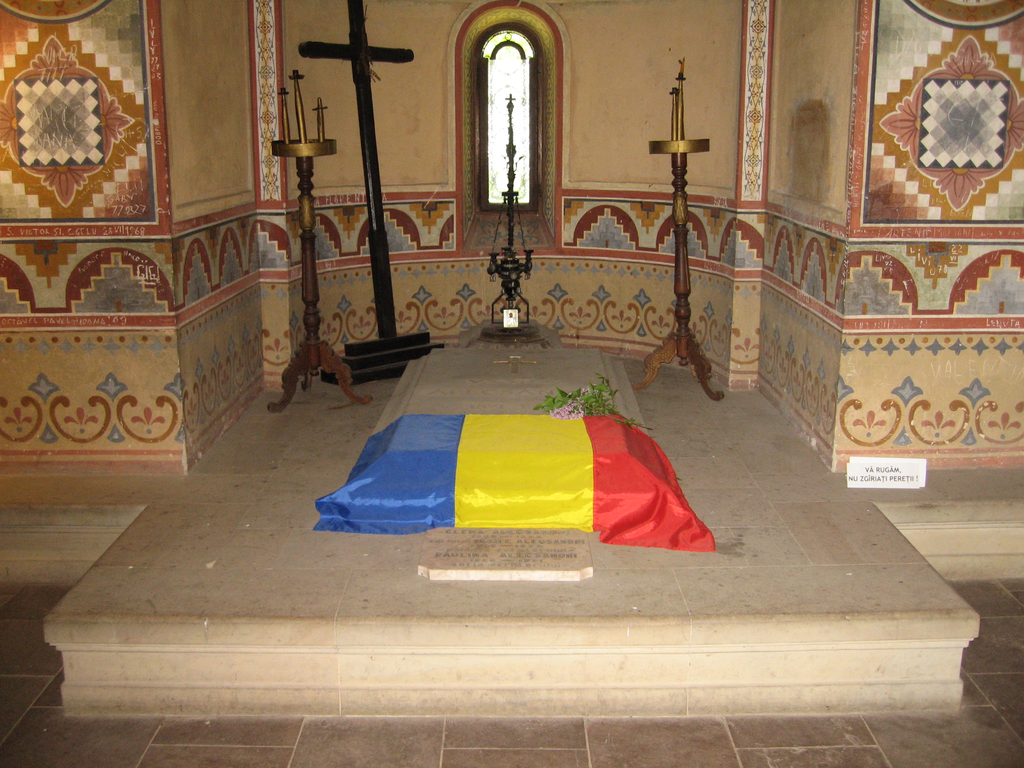 Mormântul lui Vasile Alecsandri 02